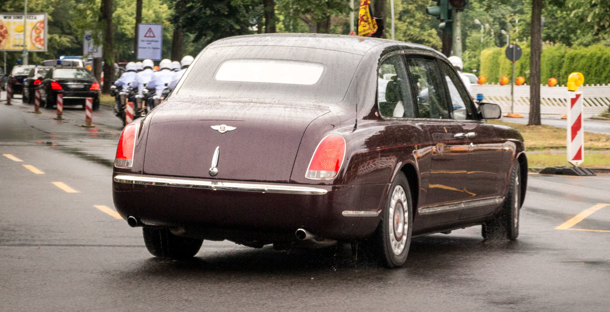 Queen in Berlin 2015